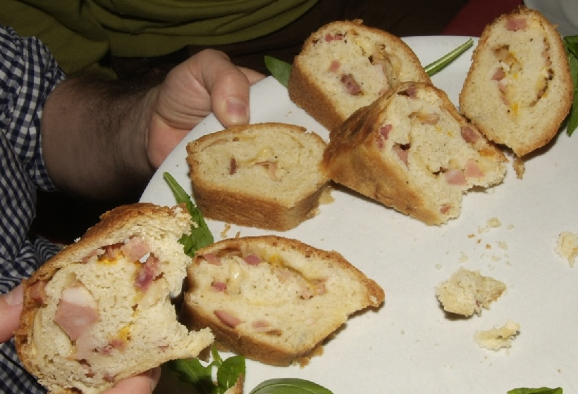 Casatiello, typical Neapolitan food